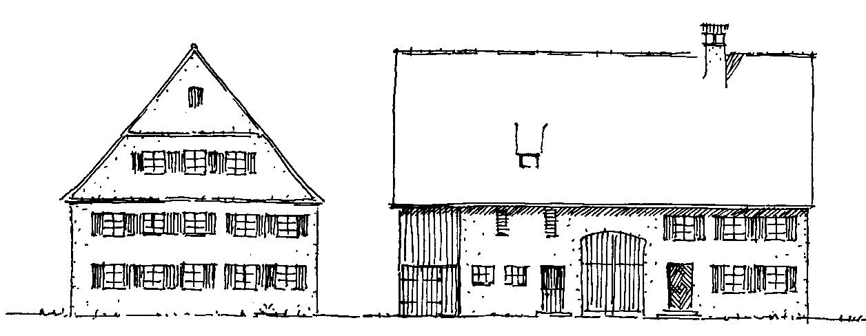 Bauernhof